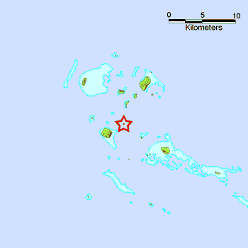 Lea faka-Tonga: no original description